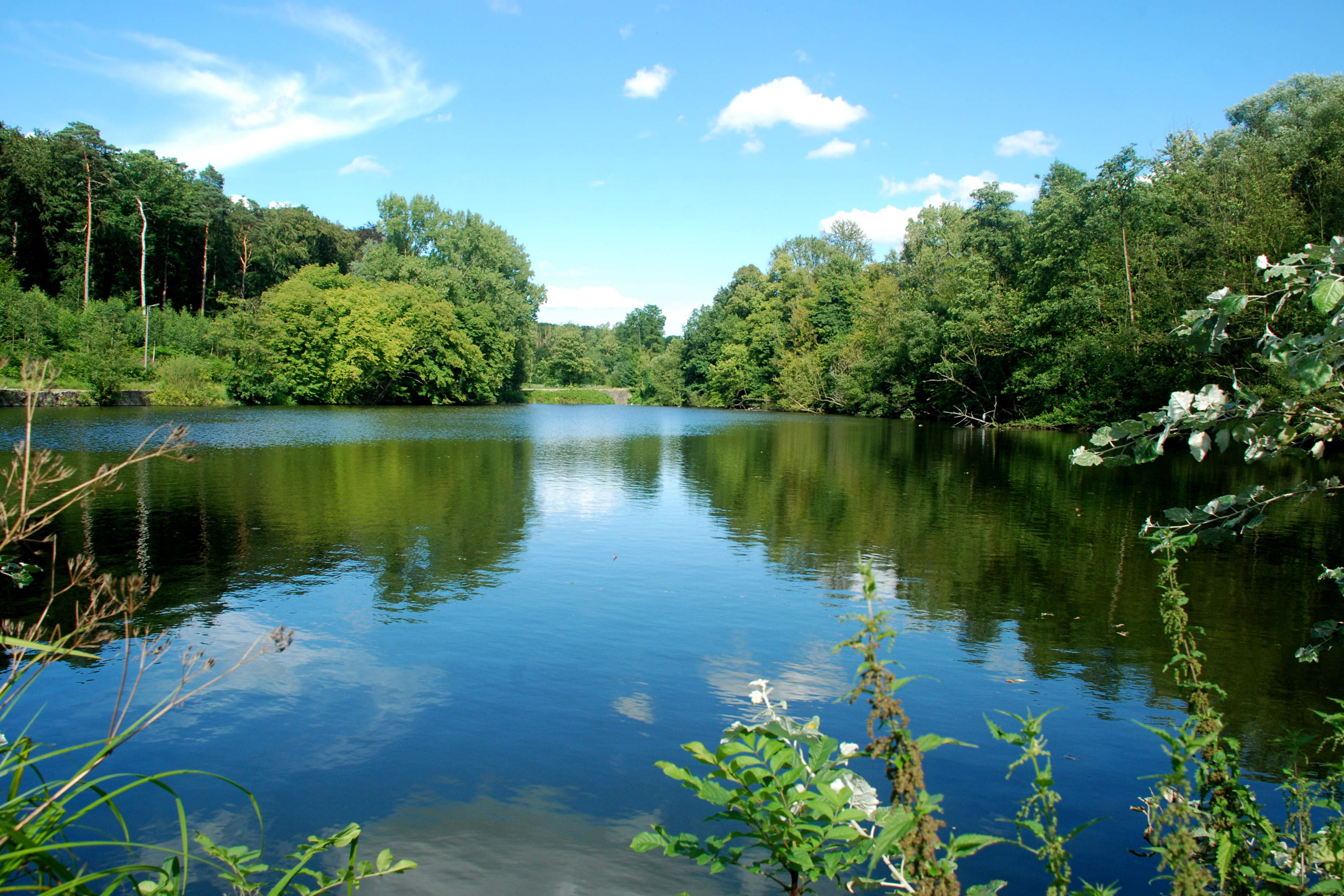 Belgique - Brabant flamand - Oud-Heverlee - Chapelle Notre-Dame de Steenbergen